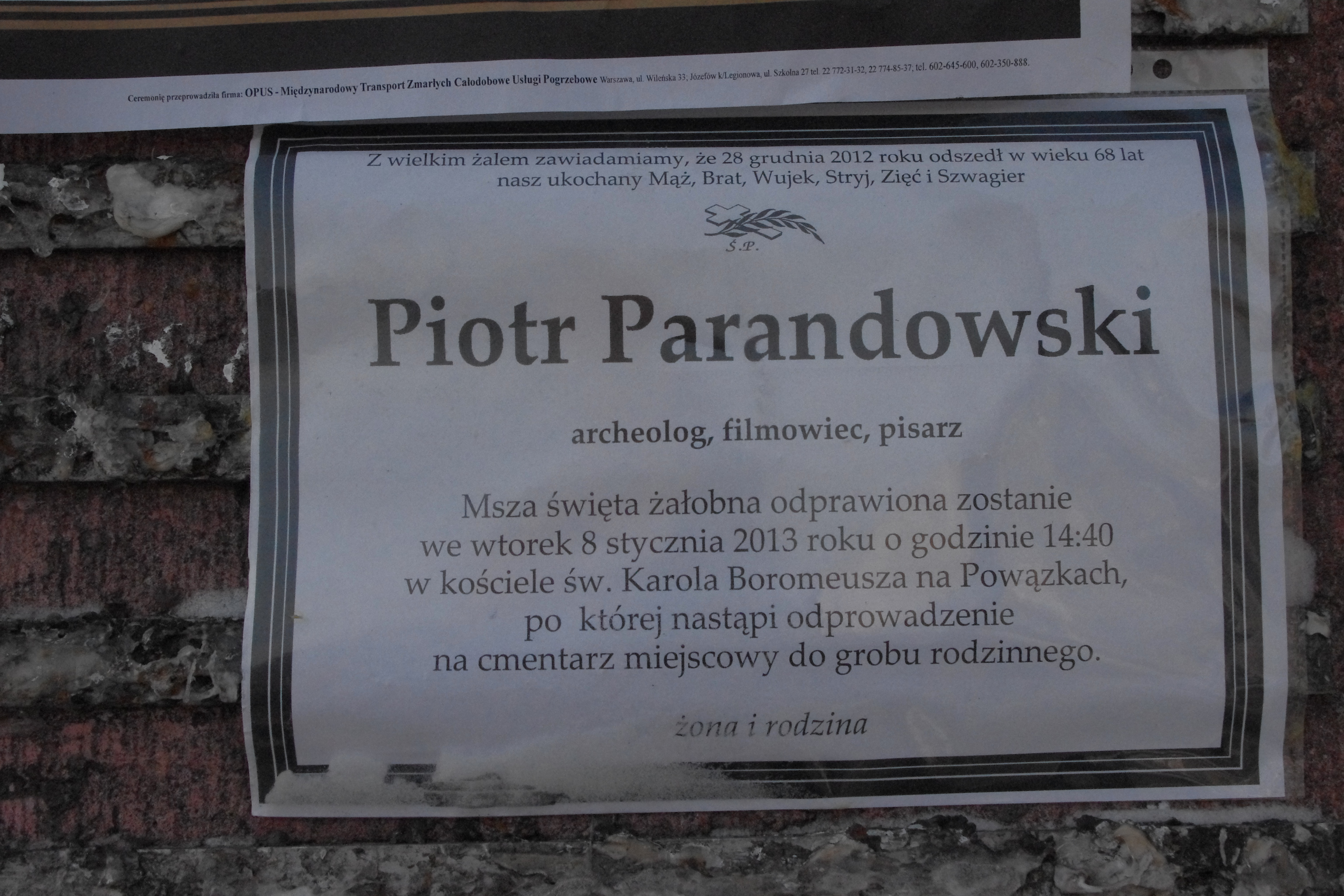 Nekrolog Piotra Parandowskiego – archeologa, autora filmów dokumentalnych i pisarza ( zm. 28 grudnia 2012) przy Kościele Niepokalanego Poczęcia Najświętszej Maryi Panny przy ul. Grójeckiej w Warszawie